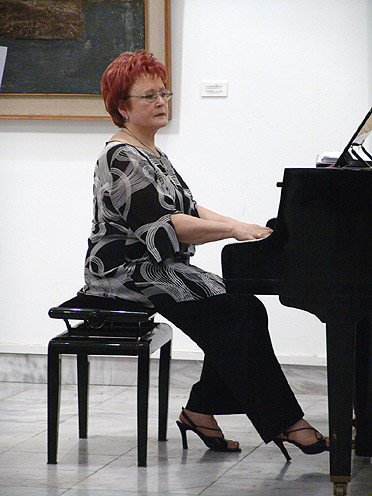 Jagoda Cvetičanin, Skopsko ljeto 2005.